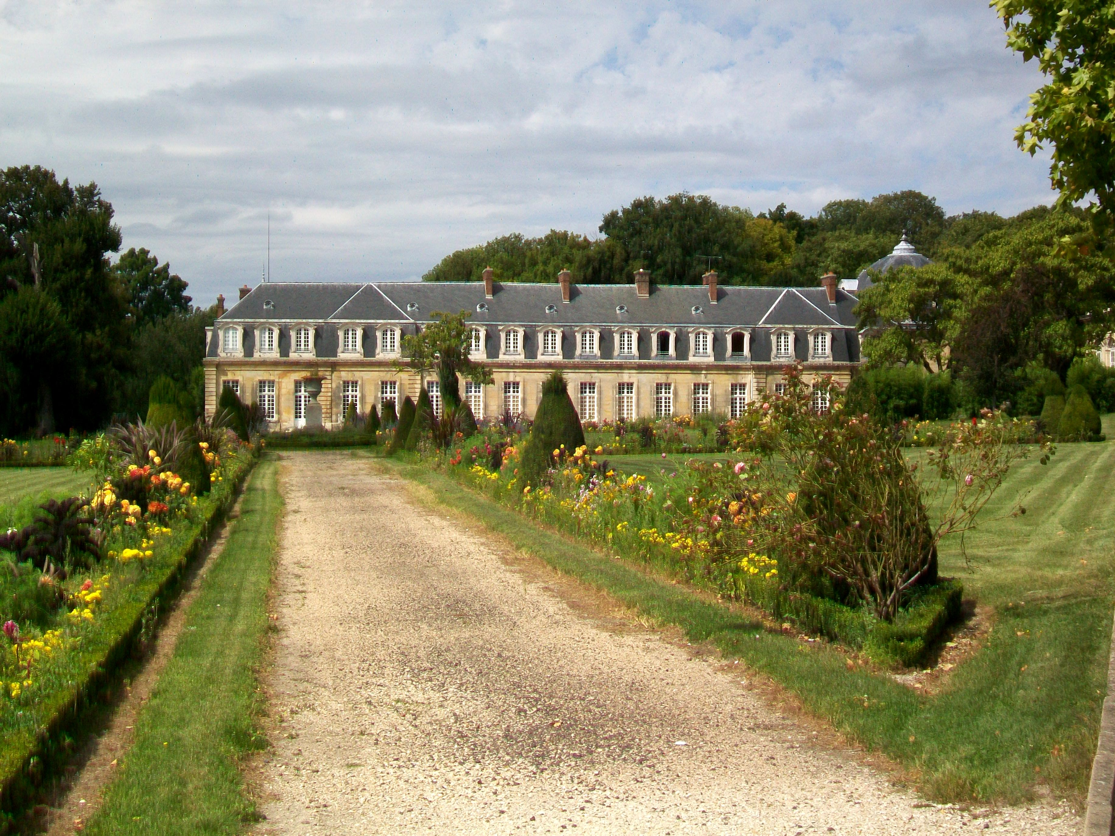 Parterres de fleurs devant le château.